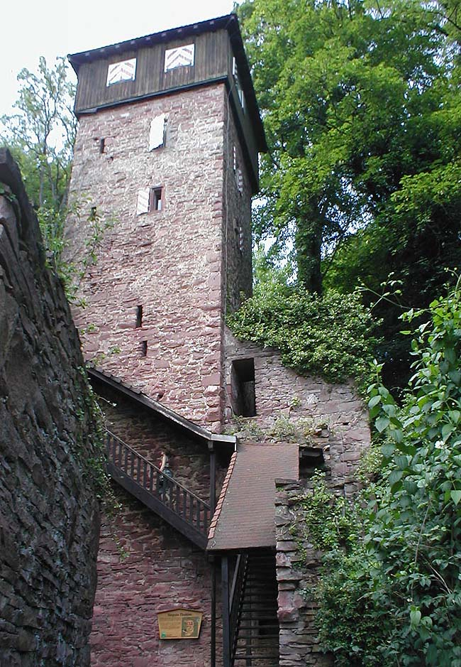 Burg Dauchstein in Binau im Odenwald